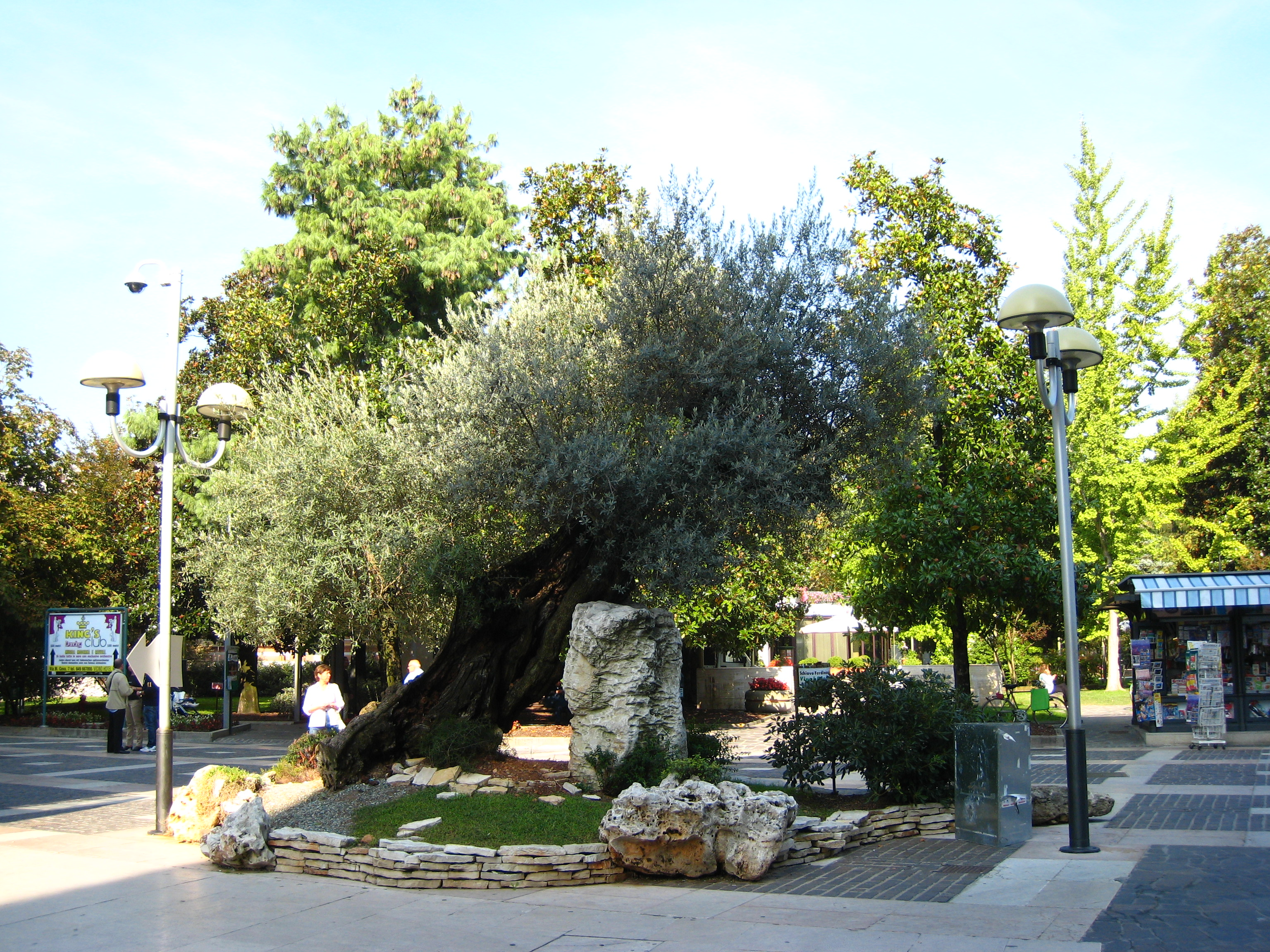 Zona pedonale di Abano Terme.